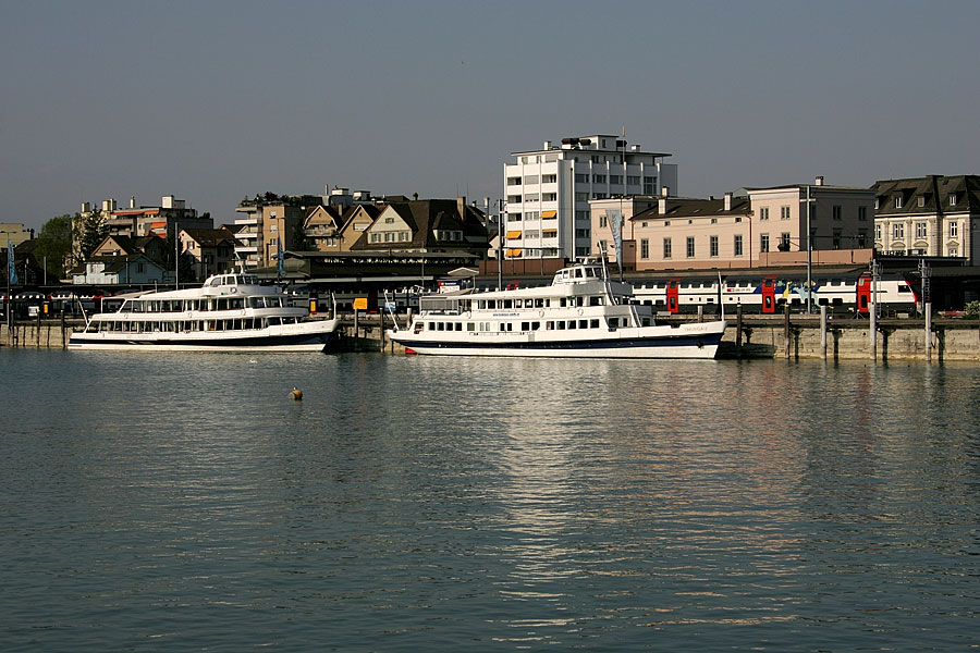 Bahnhof und Schiffsteg von Romanshorn